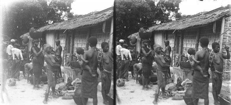 Kamerun, Yabassi, Markt Yabassi.- Markt [Kamerun, Yabassi.- Einheimische auf dem Markt (Stereobild)]